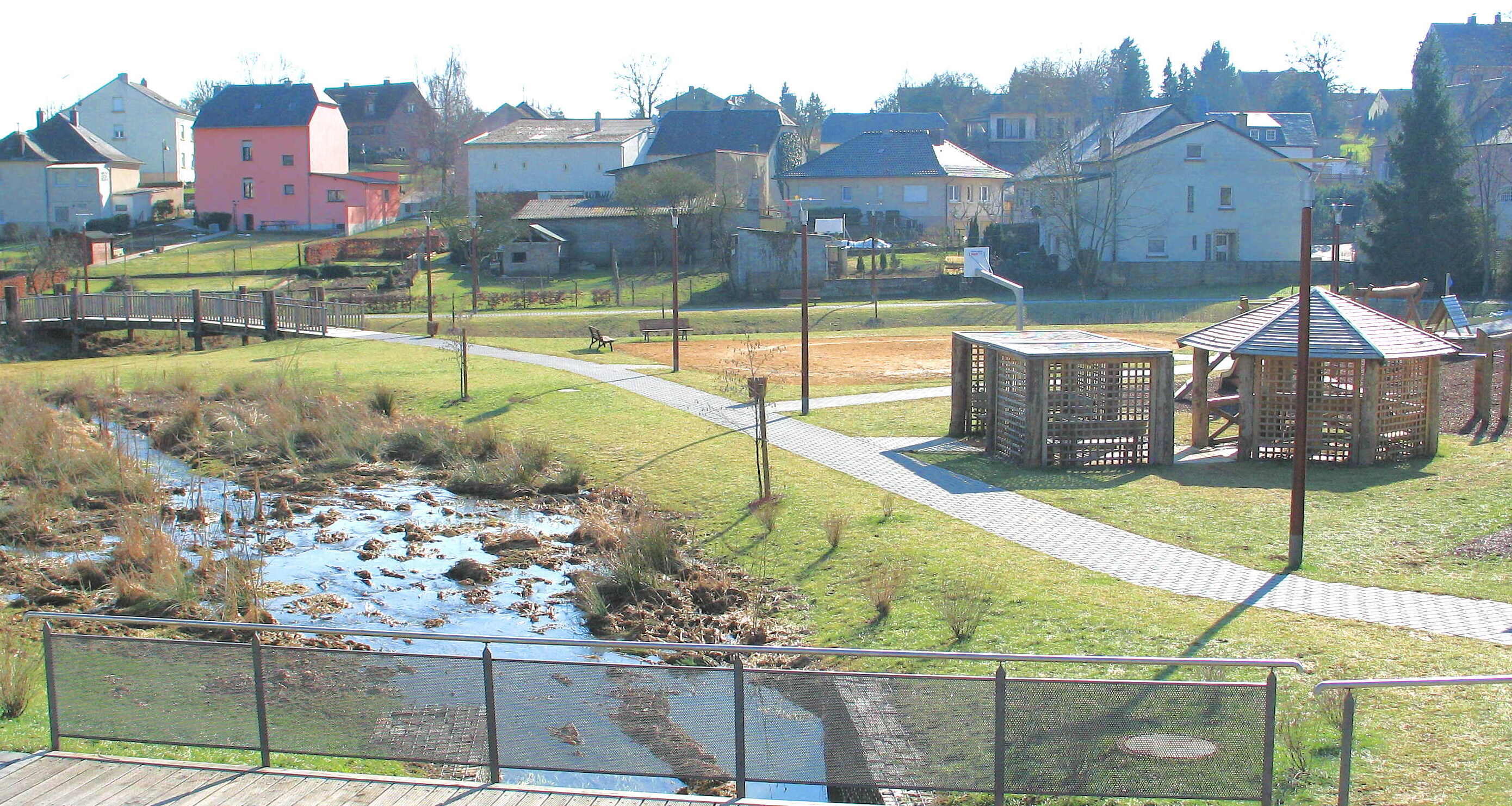 Park bei der Gemeng zu Schuller (Mäerz 2006)